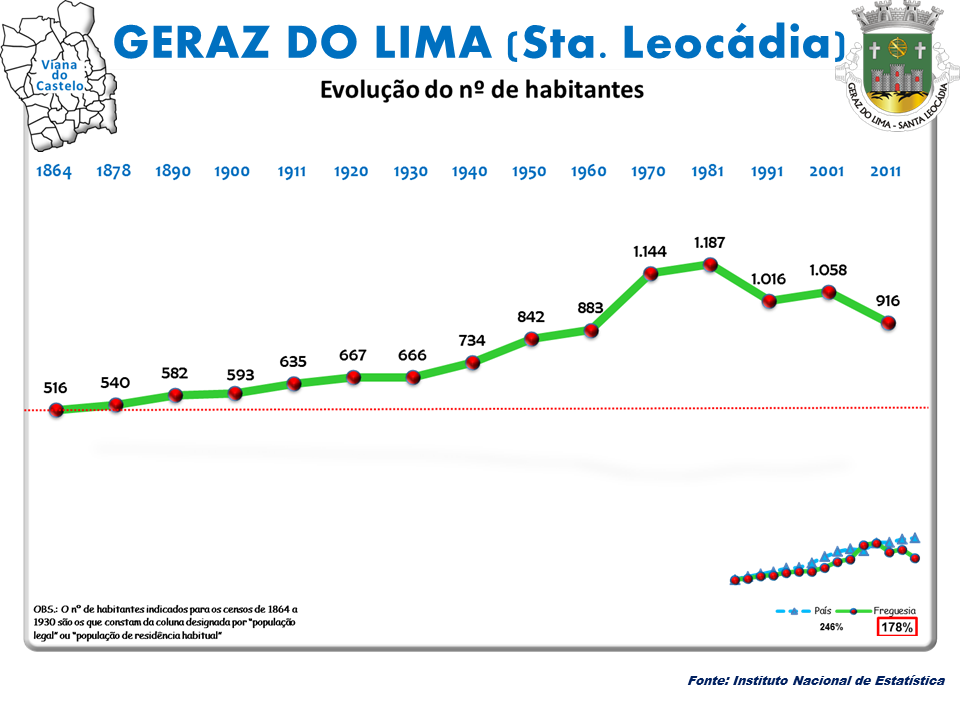 Censos 1864/2011